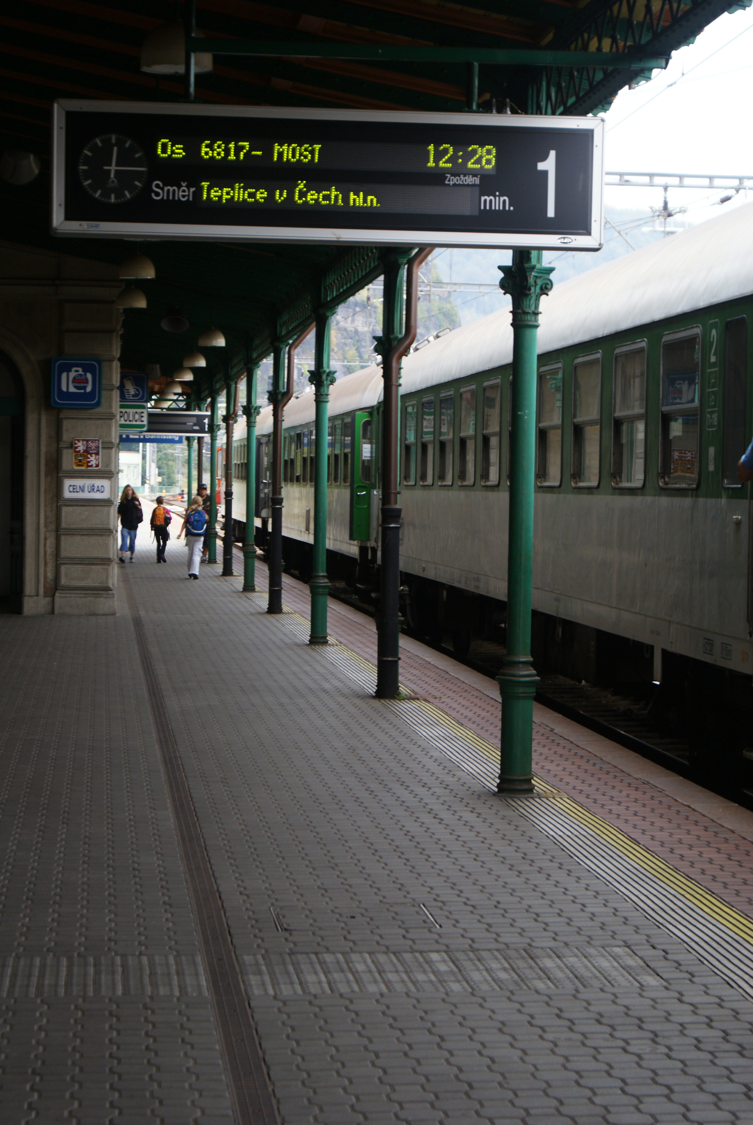 nastupiste Decin hl.n.jpg